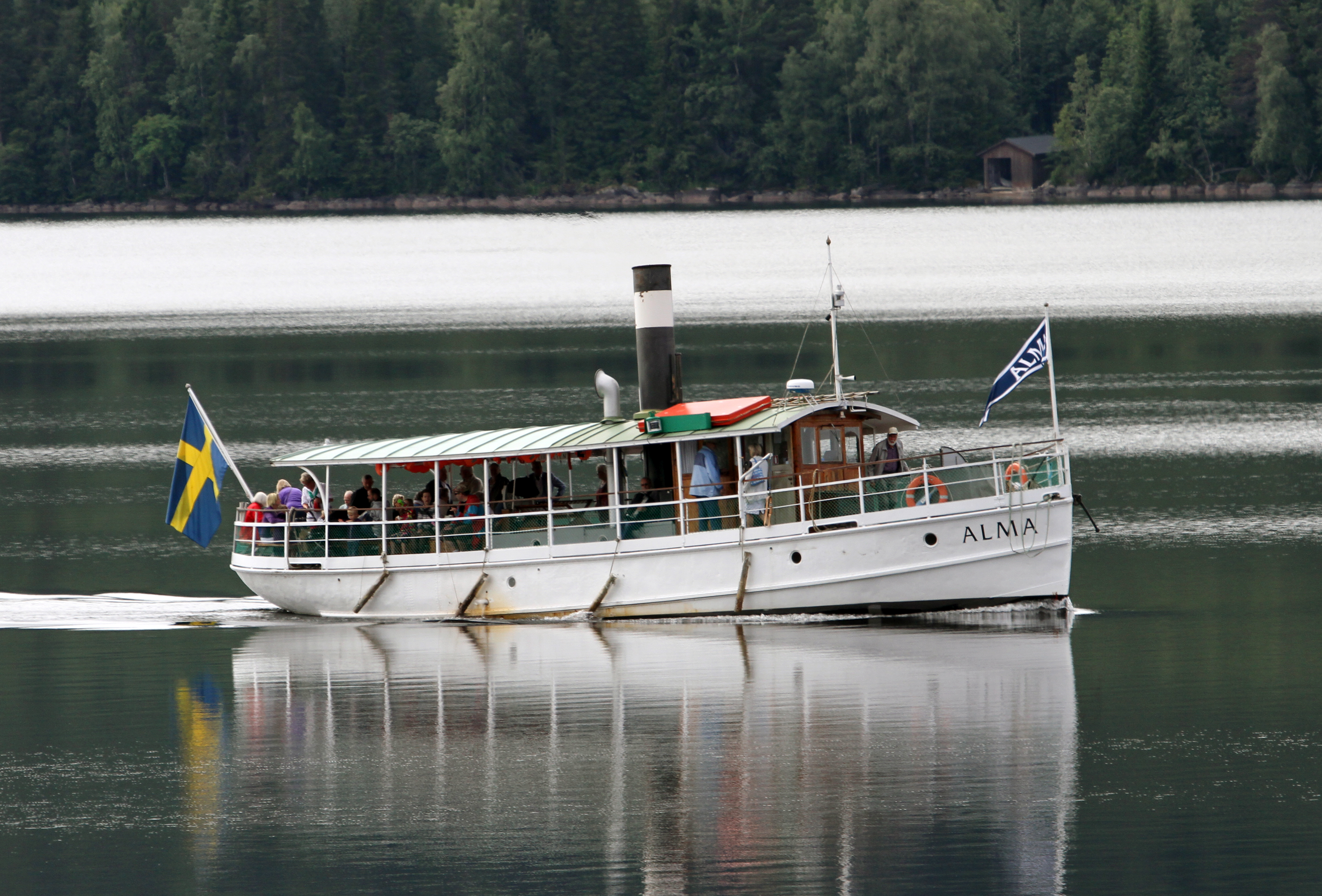 S/S Alma af Stafre (1873) på Revsundssjön This is an image of a protected Swedish ship, with call sign FSC 2879 .